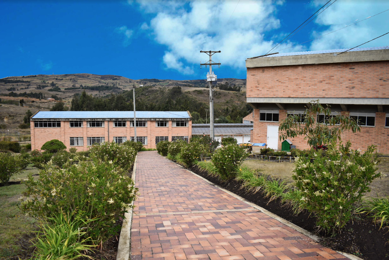 Campus de la Fundación Universitaria Juan de Castellanos